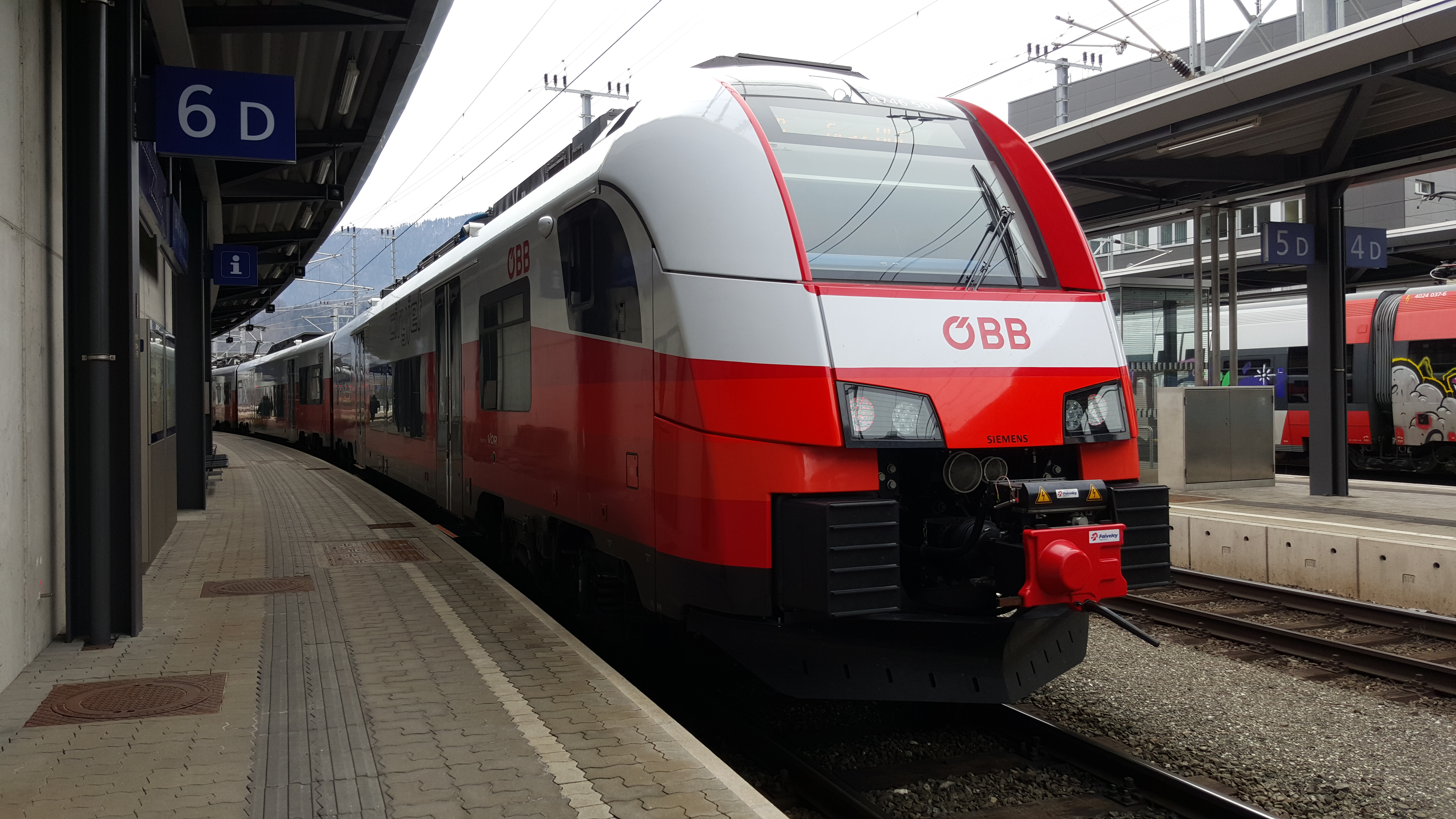 ÖBB cityjet im Bahnhof Bruck an der Mur